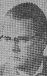 Arkitekten Anders Dalborg